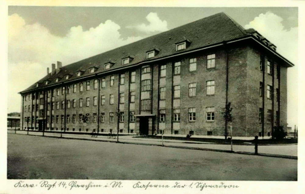 Kasernengebäude des Reiterregiments Nr. 14. zwischen der Flörke- und Cordesiusstraße in Parchim